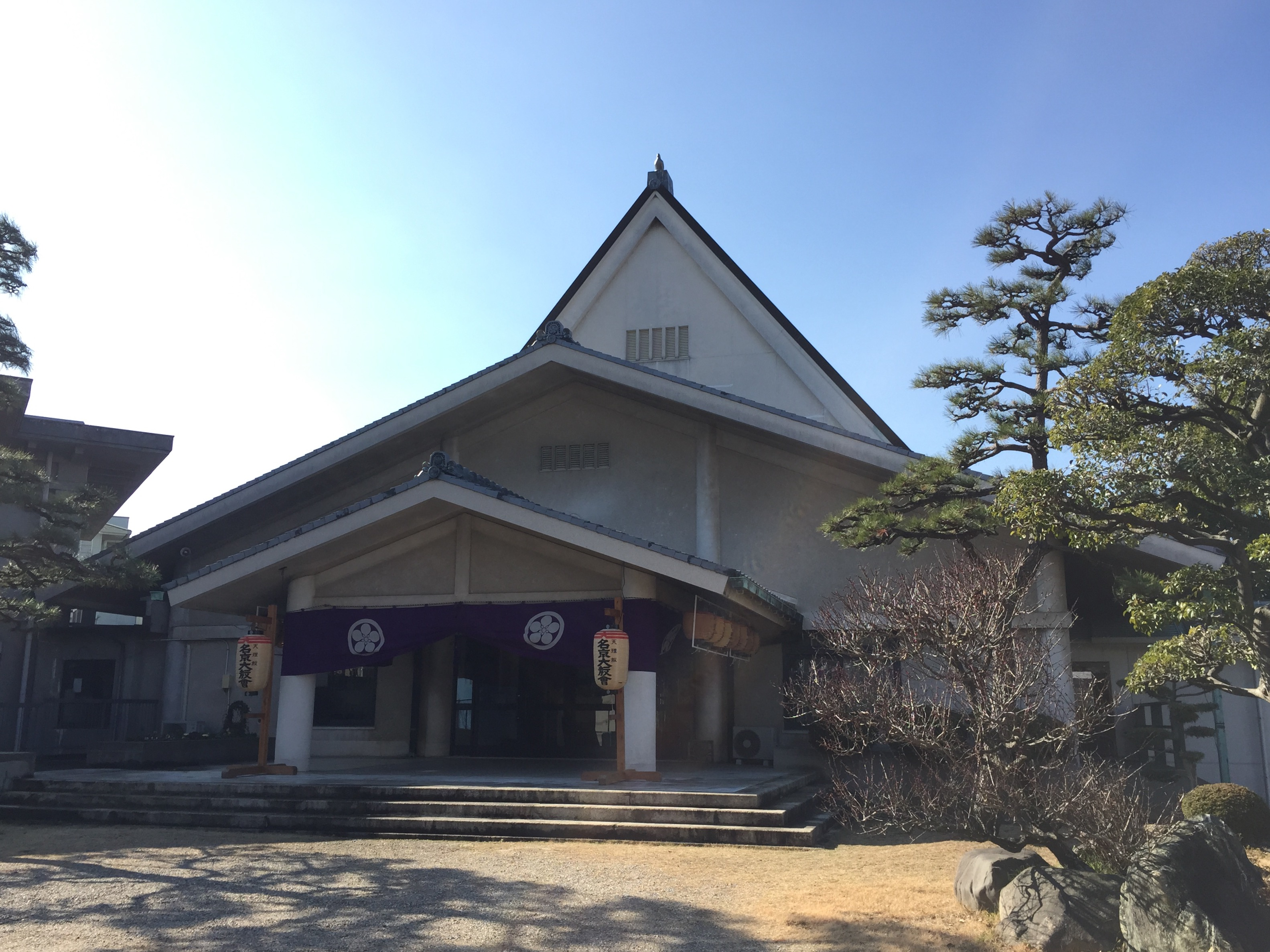 名京大教会神殿玄関の写真。春季大祭時撮影。